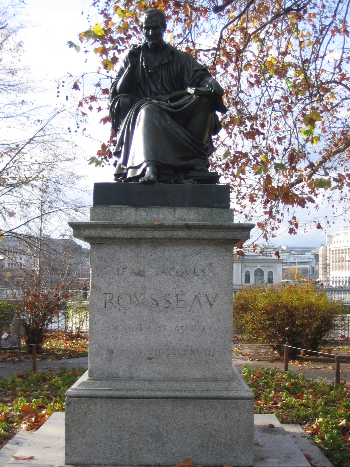 Statue de J.-J. Rousseau sur l'ile des Berges à Genève